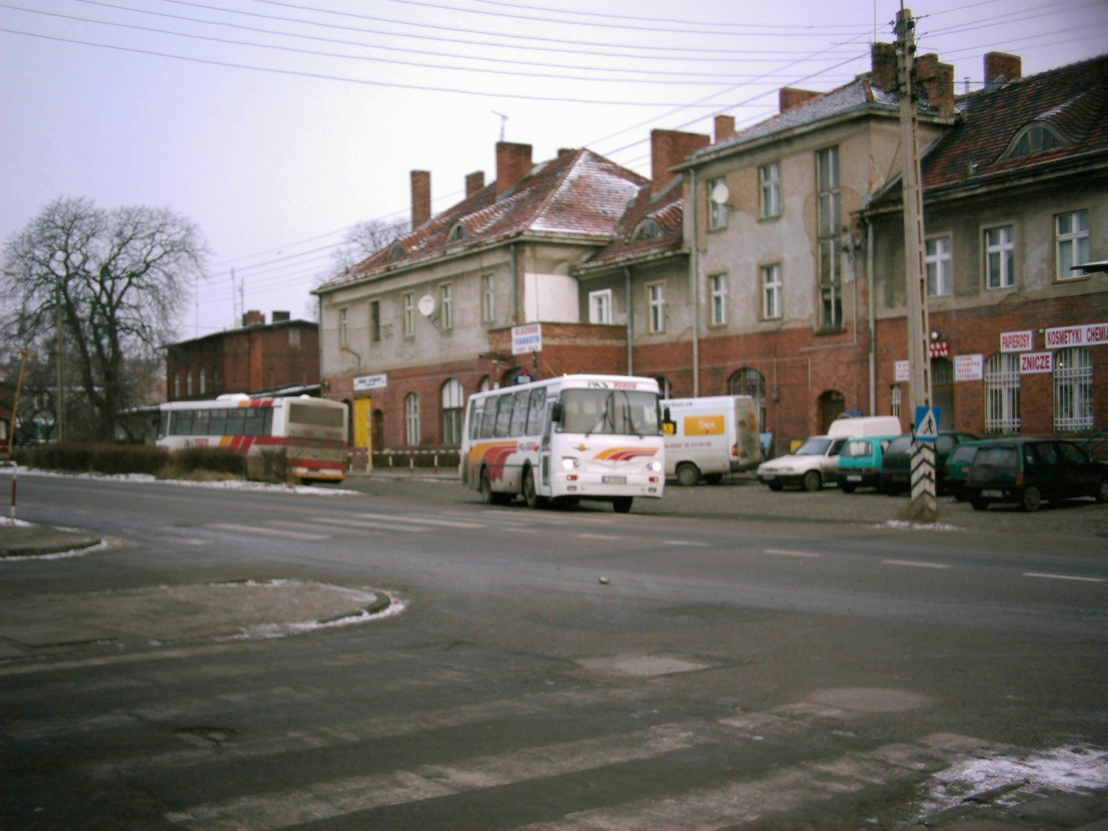 Chełmno, dworzec autobusowy, dawny dworzec kolejowy.